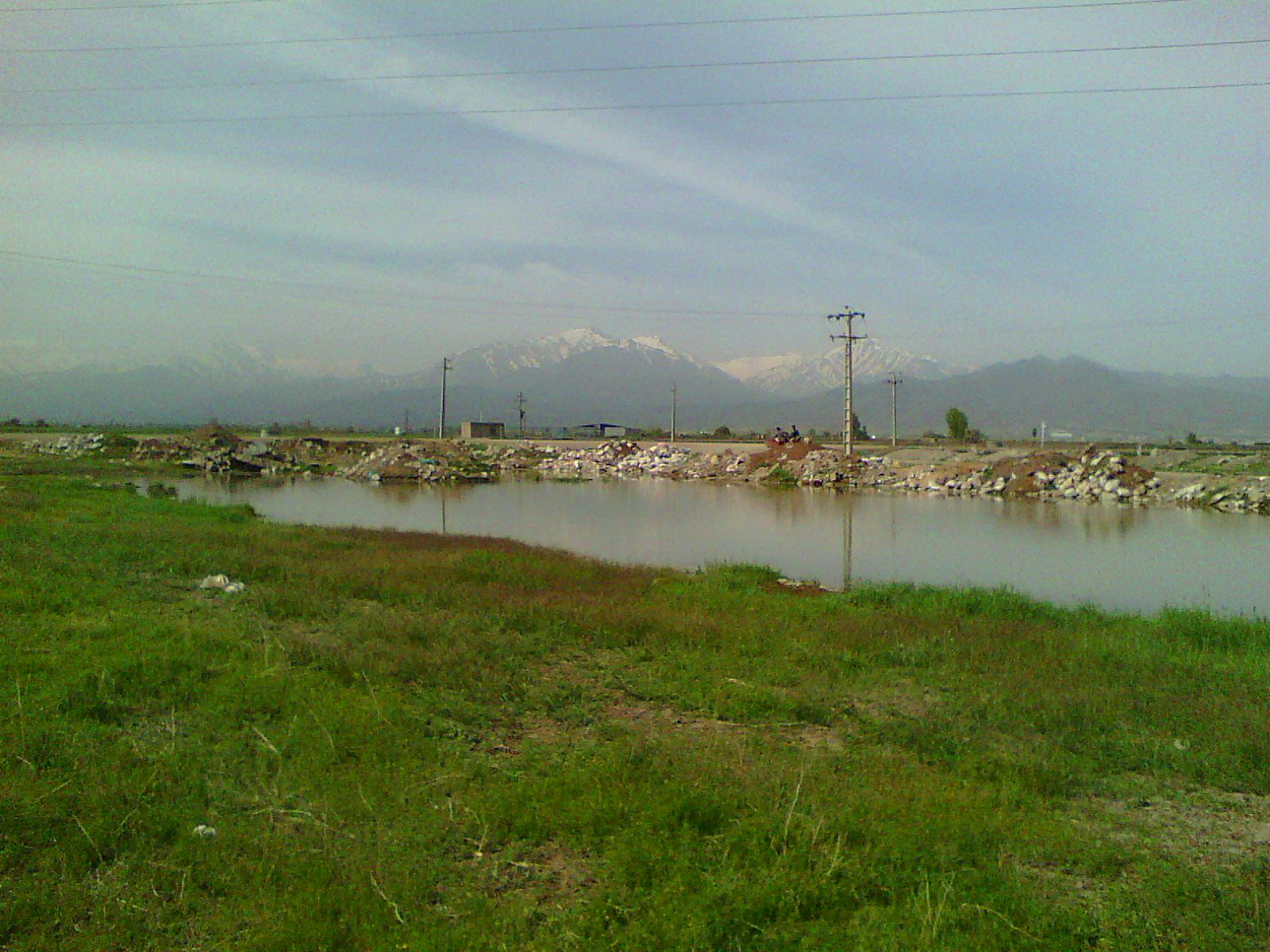 بقایای دریاچه باستانی زریوار